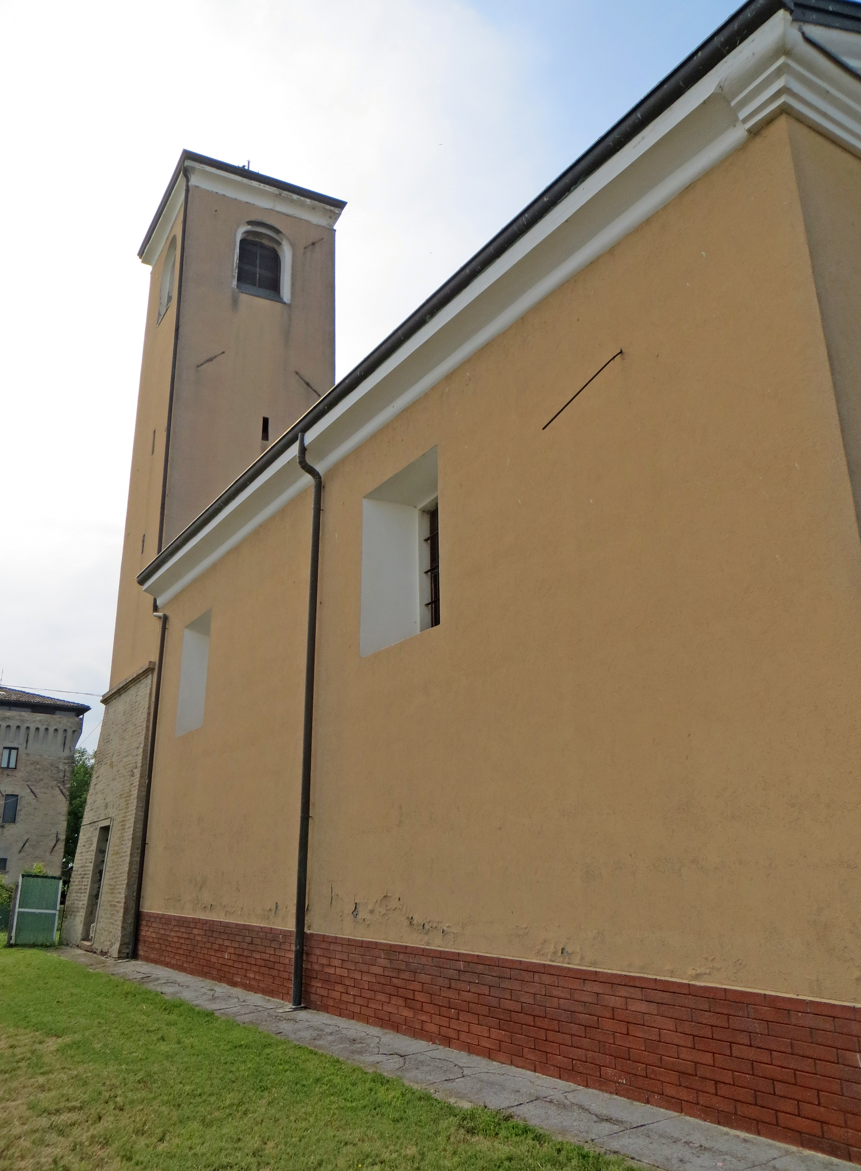 Chiesa della Purificazione di Maria Vergine (Beneceto, Parma) - lato sud